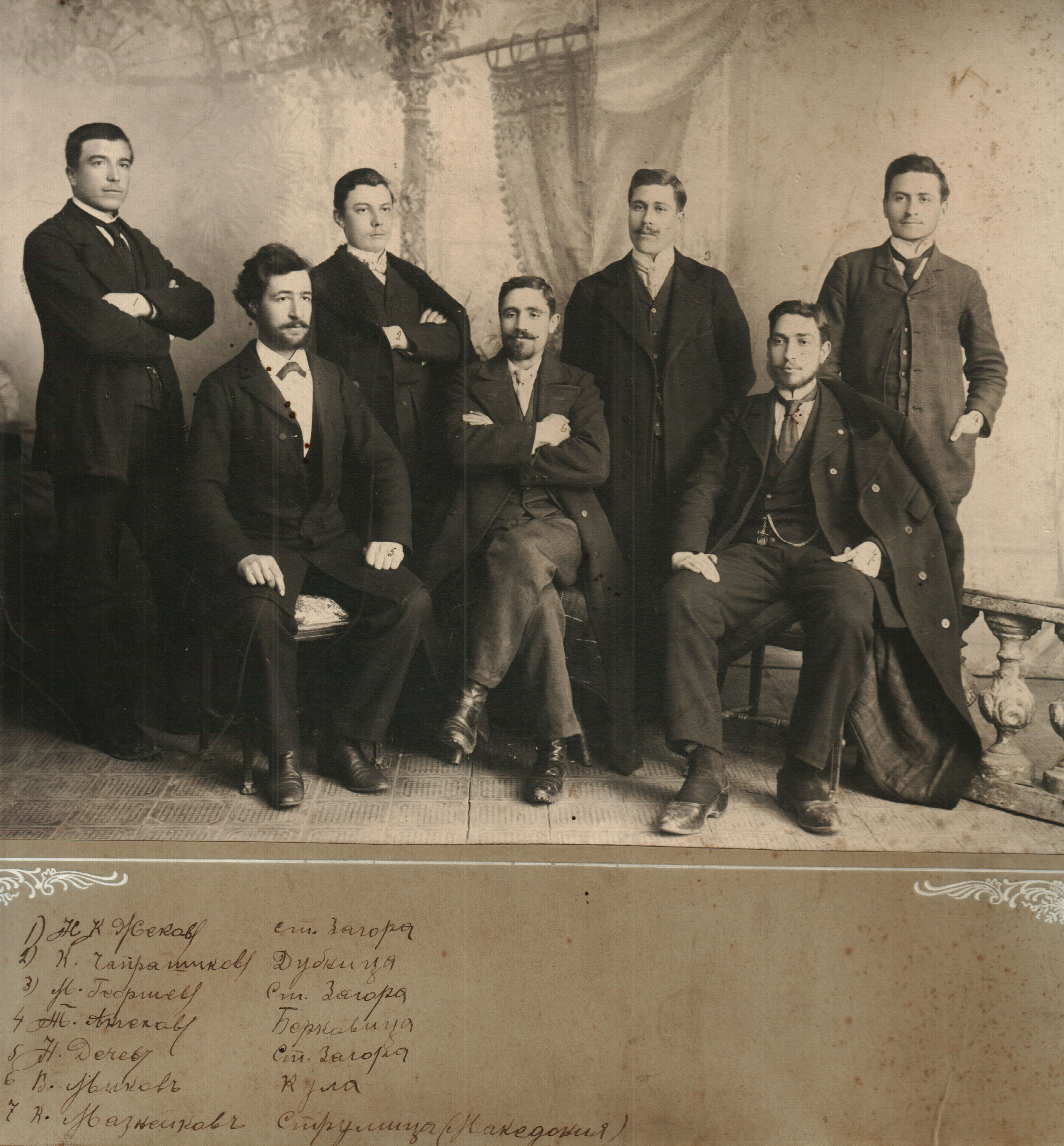 Снимка на Никола Костов Жеков от Стара Загора, Крум Чапрашиков от Дупница, Марин Георгиев от Стара Загора, Тимо Ангелов от Берковица, Никола Дечев от Стара Загора, Велко Миков от Кула и Коста Мазнейков от Струмица